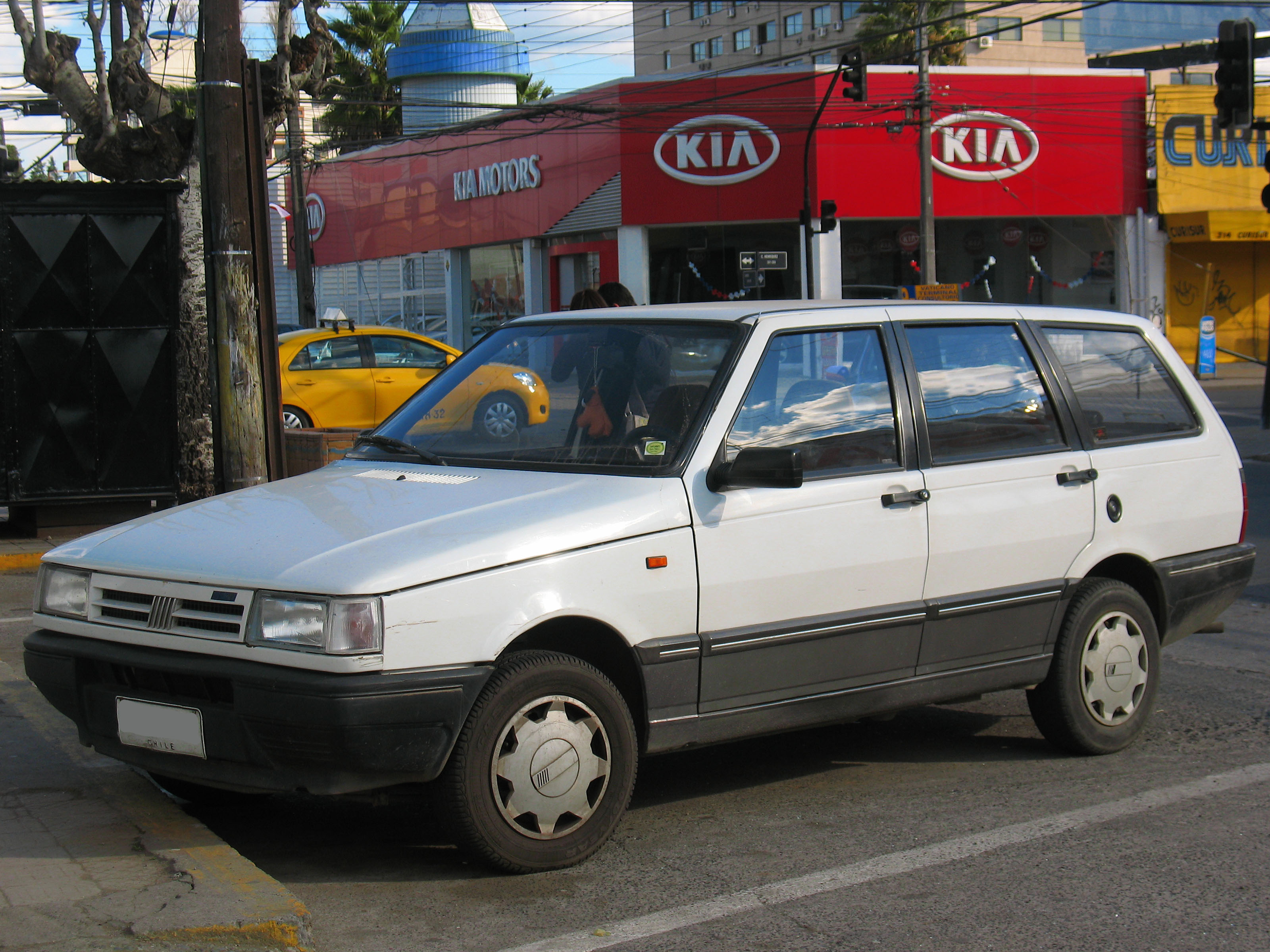 Fiat Duna 1.6 SE Weekend 1992